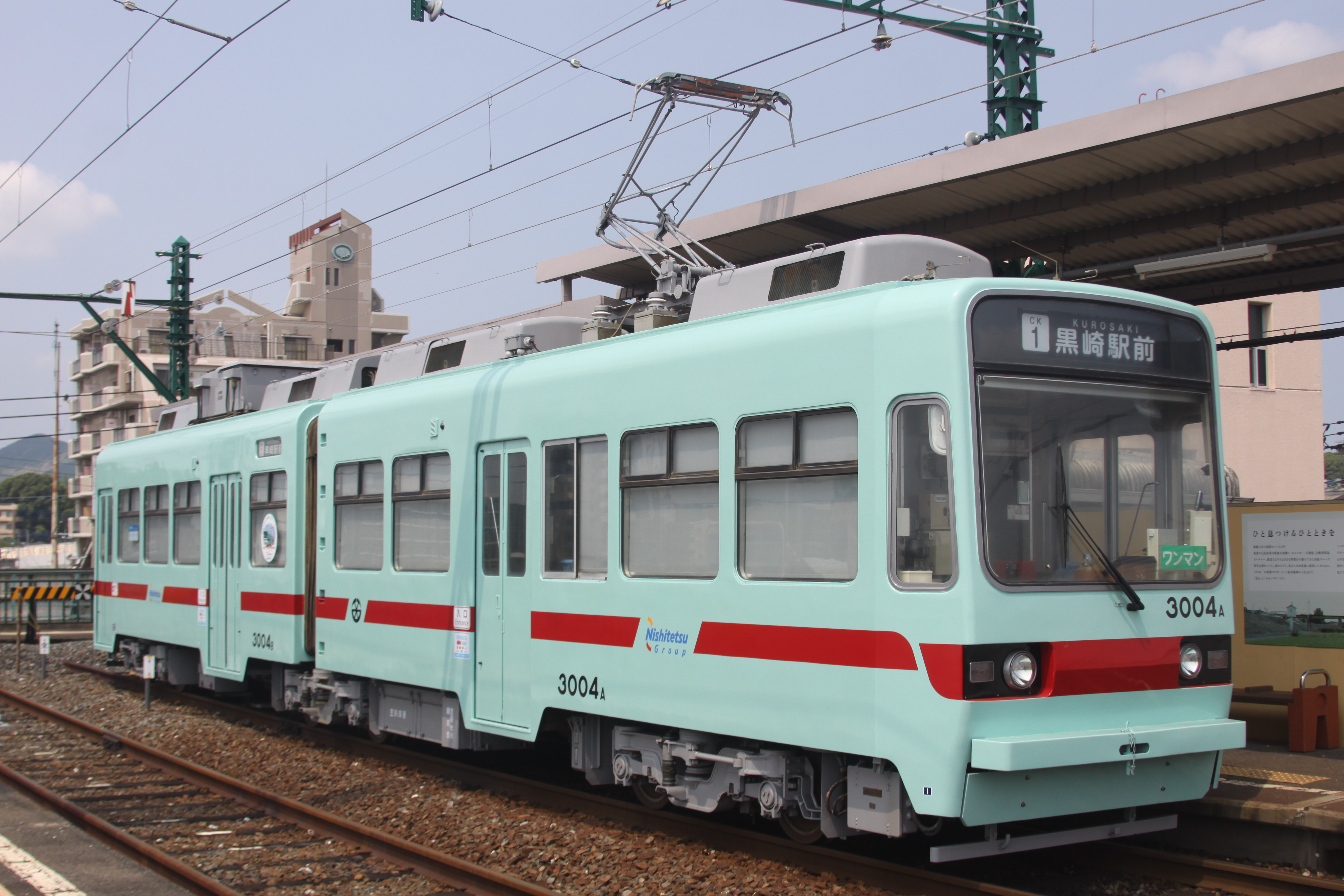 西鉄天神大牟田線のアイスグリーン塗装に変更された3004．